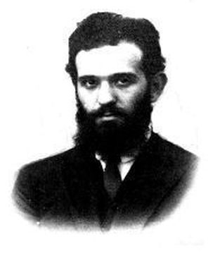 Marcel Pauker (n. 6 decembrie 1896, București - d. 16 august 1938 în localitatea Blutovo în apropiere de Moscova, executat în cadrul epurărilor staliniste), a fost un intelectual și lider comunist român, fiul unei familii evreiești înstărite din București și soțul liderei comuniste române Ana Pauker (Rabinsohn) de origine evreiasca.